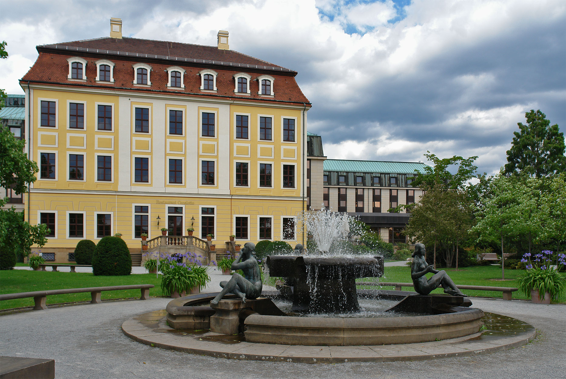 Springbrunnen vor dem Bellevue Dresden